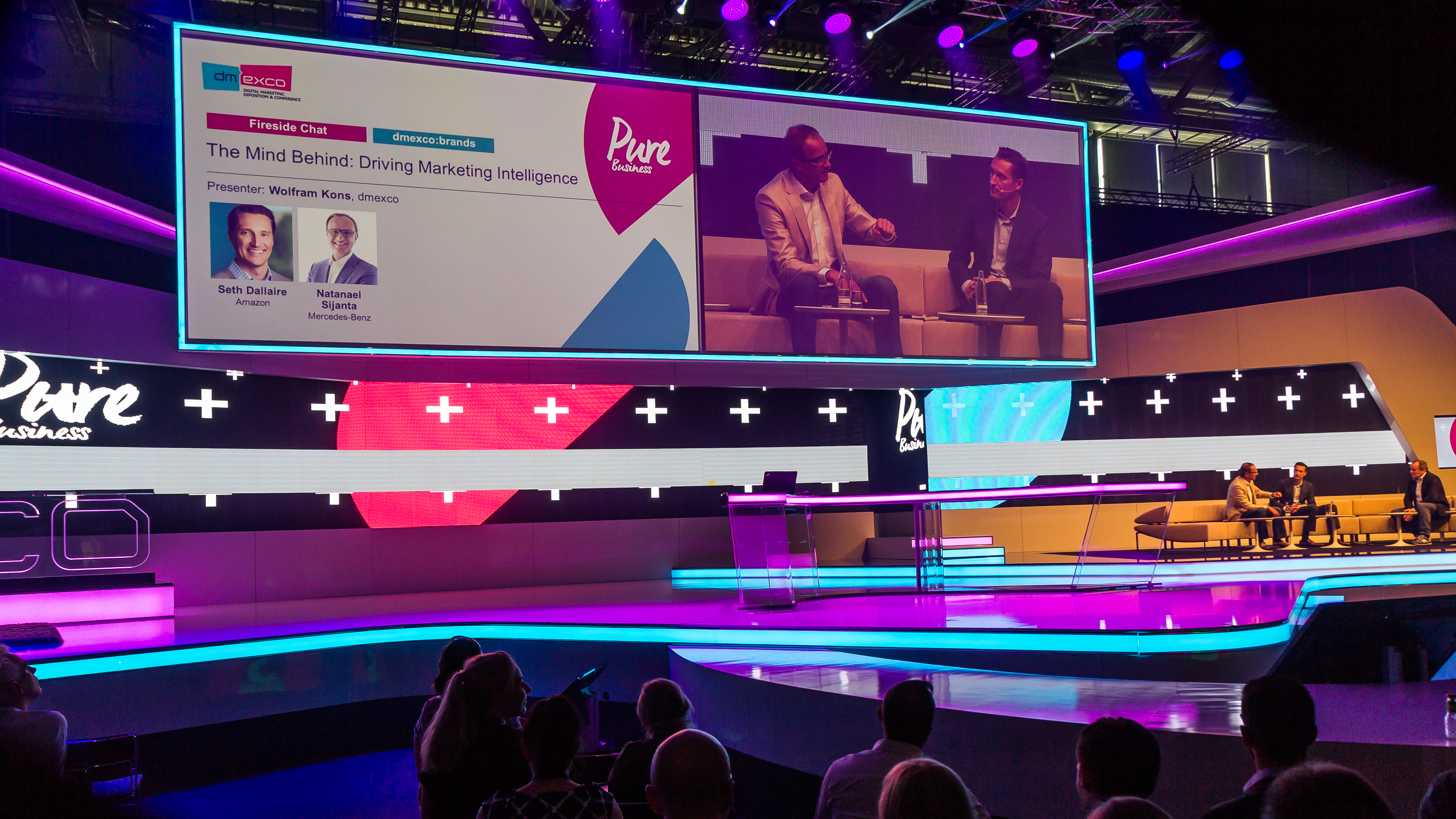 dmexco 2016. In der Congress Hall: The Mind Behind: Driving Marketing Intelligence. Auf dem Podium: Seth Dallaire (Amazon), Natanael Sijante (Mercedes-Benz). Presenter: Wolfram Kons (dmexco)